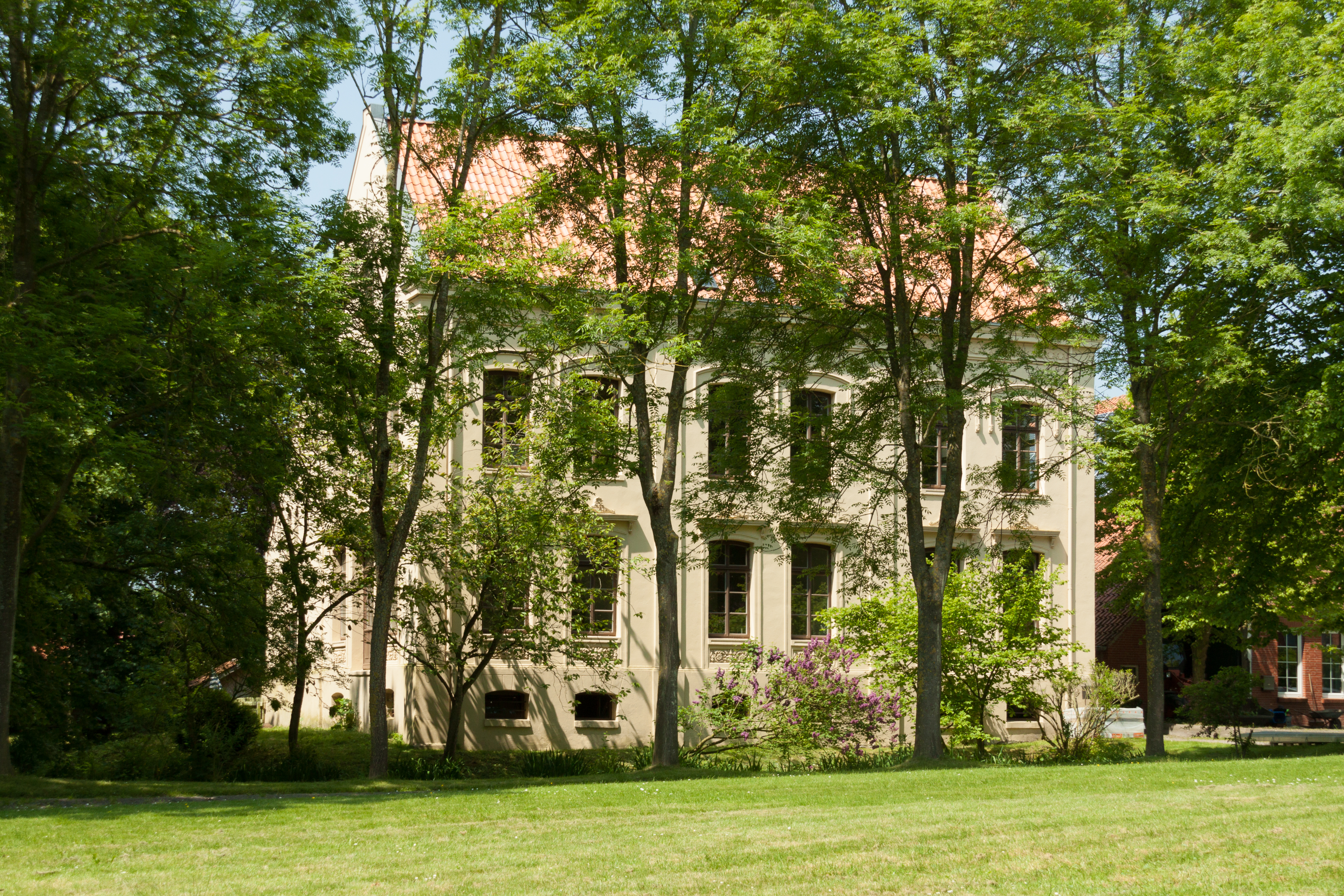 Die Midelsteburg in Groothusen (Krummhörn)